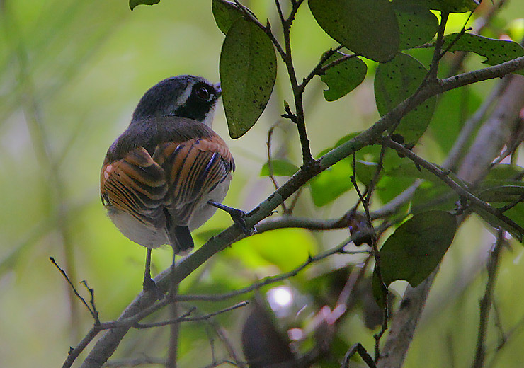 A female. Image taken in Arabuko-Sokoke Forest, Kenya.